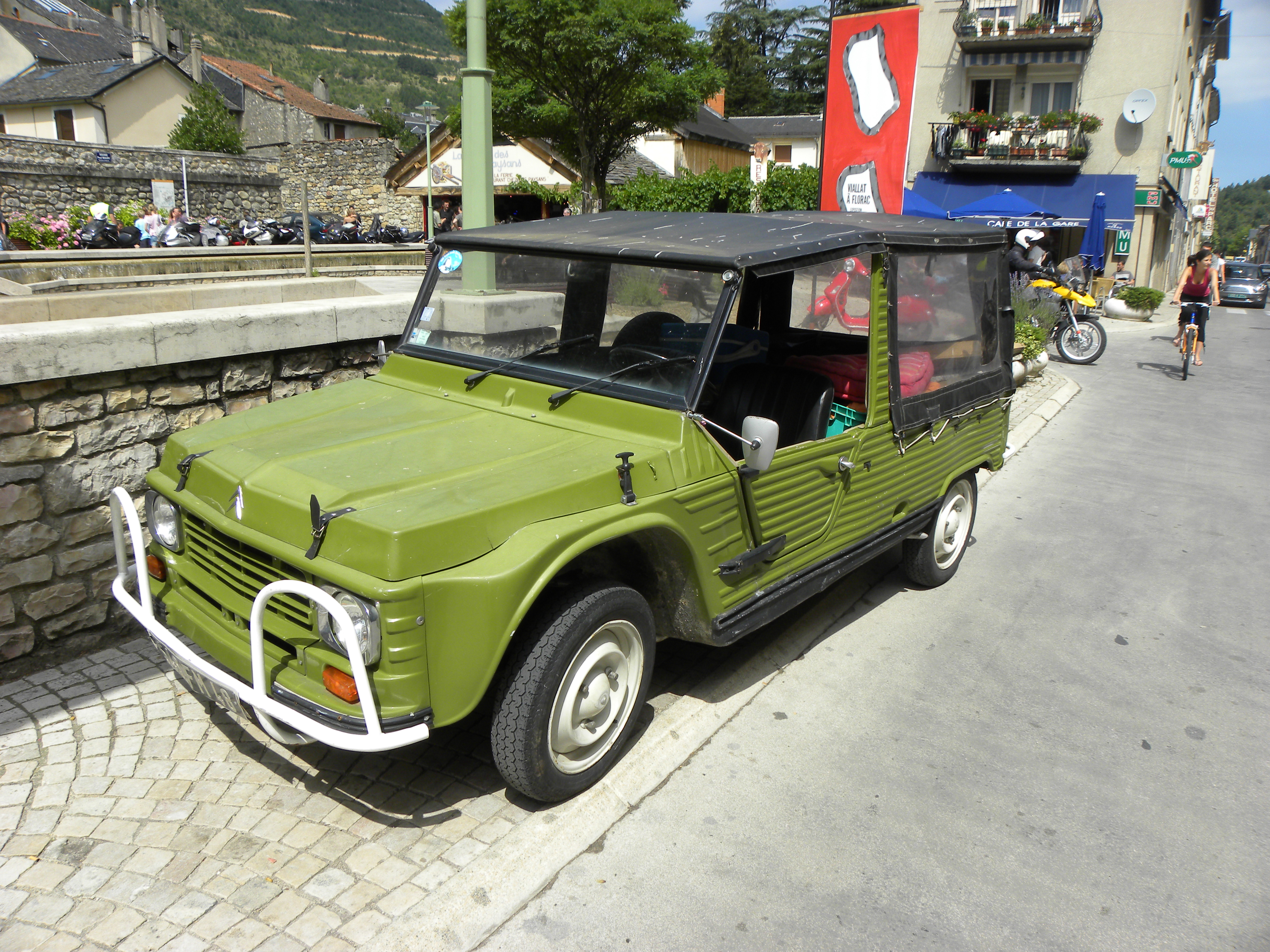 Citroen Mehari